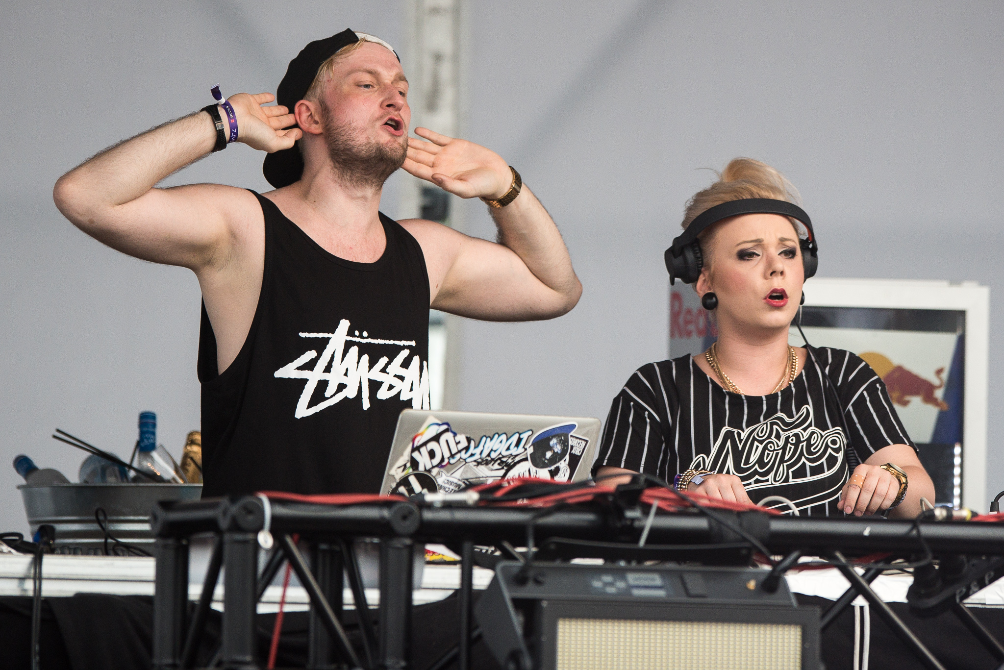 Festival,Konzert,Livekonzert,Livemusik,Mainstage,Musik,Open Beatz 2016,Ostblockschlampen